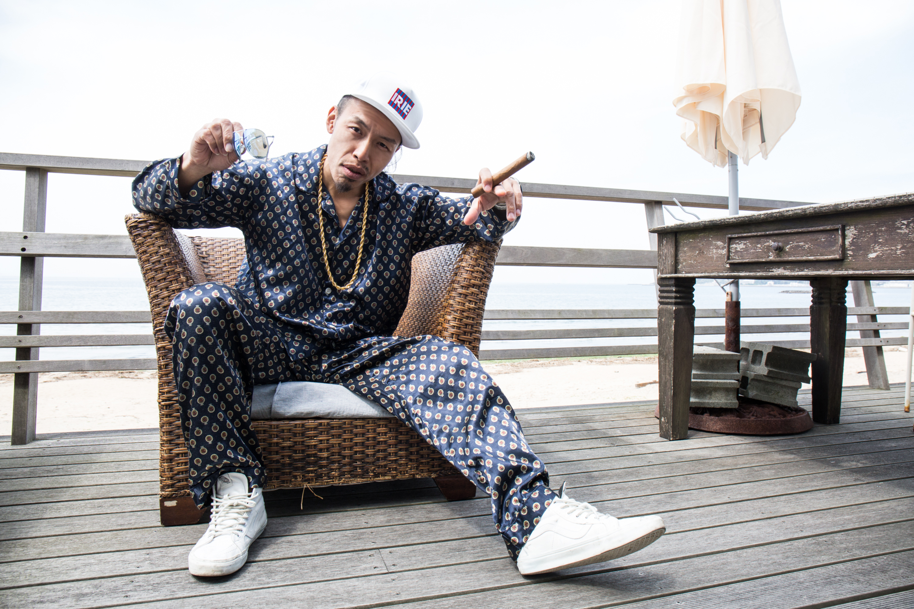 Spinna B-ILL Photo